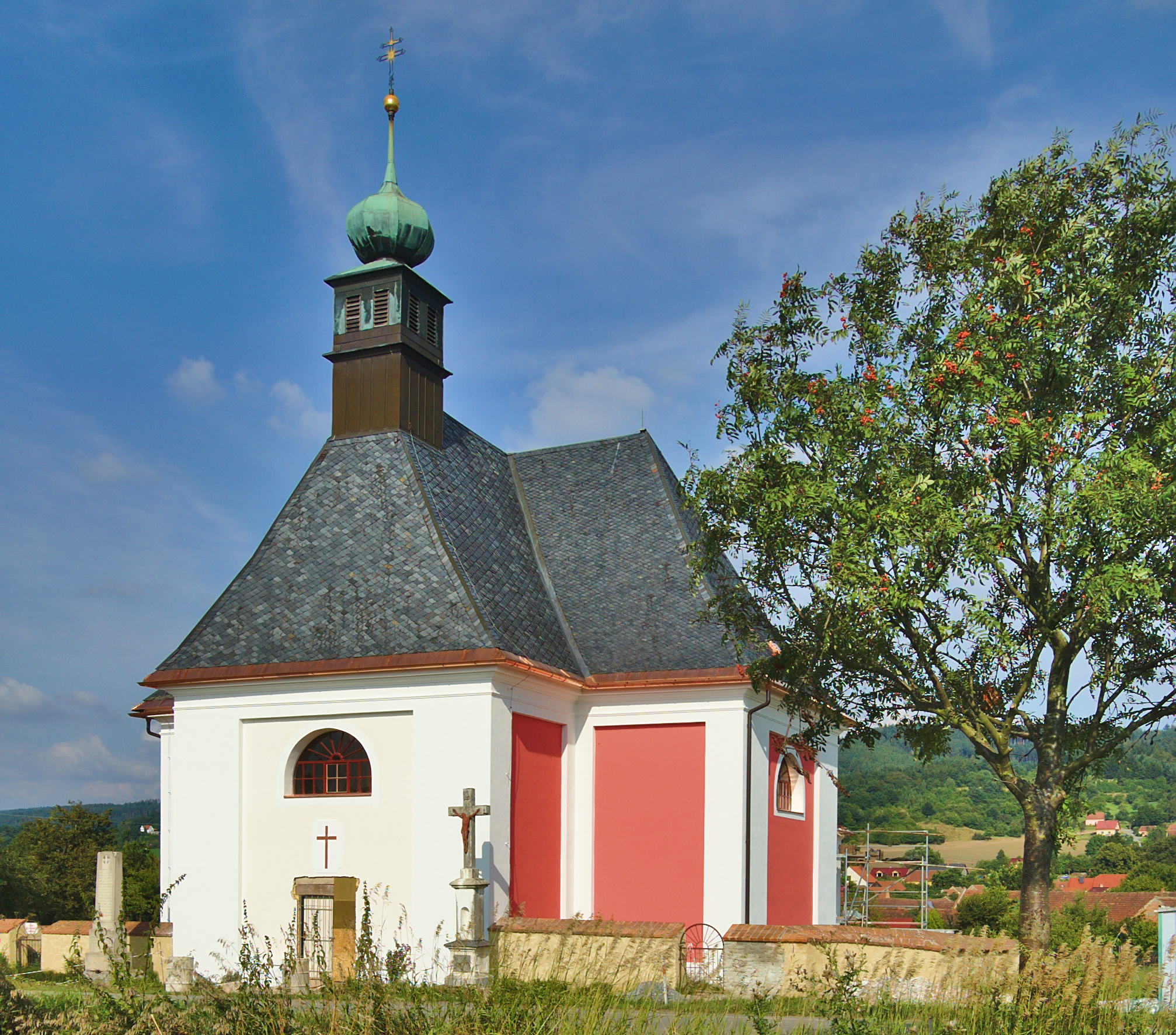 Kostel Zvěstování Panny Marie, Vážany, okres Blansko